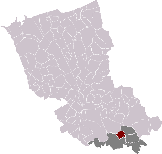 Locatie gemeente Nieuw-Berkijn in arrondissement Duinkerke. Zelfgemaakt. Location of Neuf-Berquin municipality in the arrondissement of Dunkirk. Self made. Localisation de la commune de Neuf-Berquin dans l'arrondissement de Dunkerque. Fait moi-même.